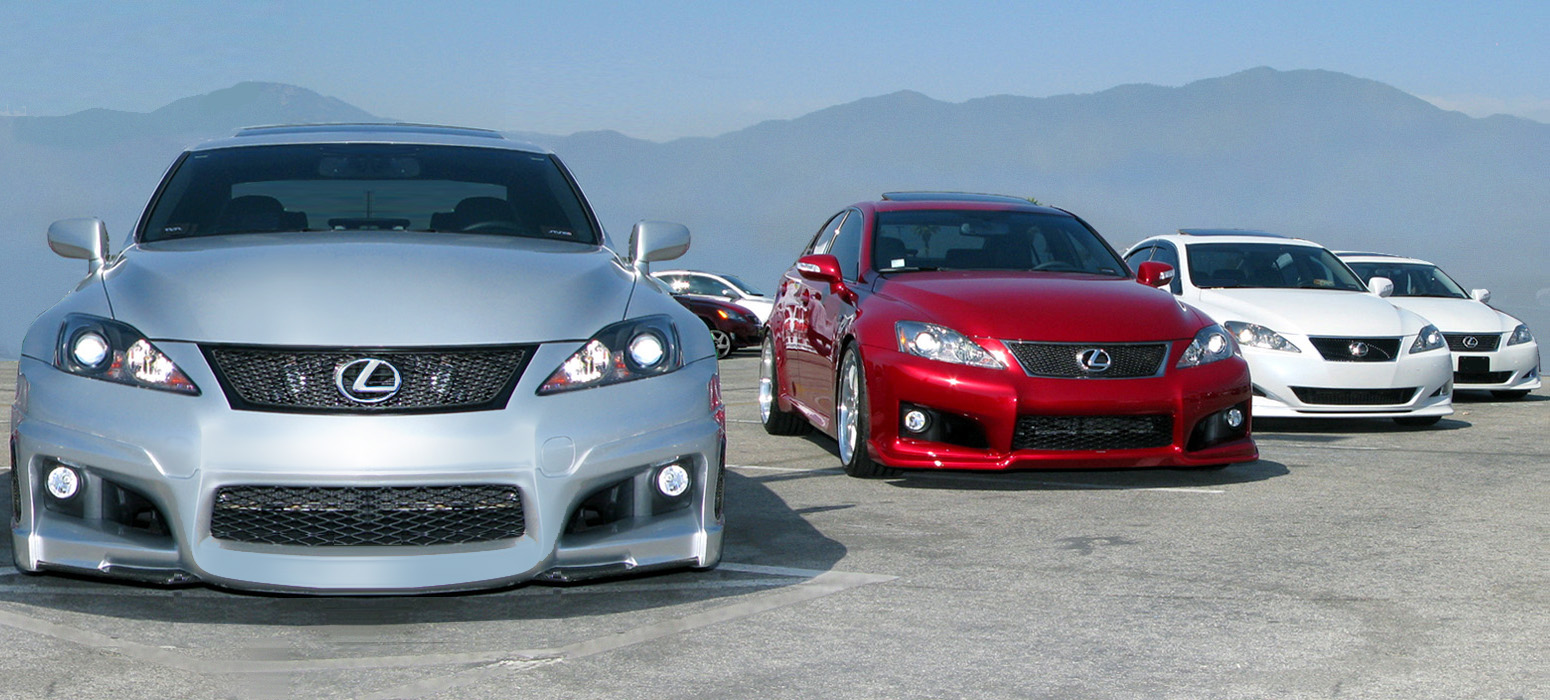 IS-F and friends